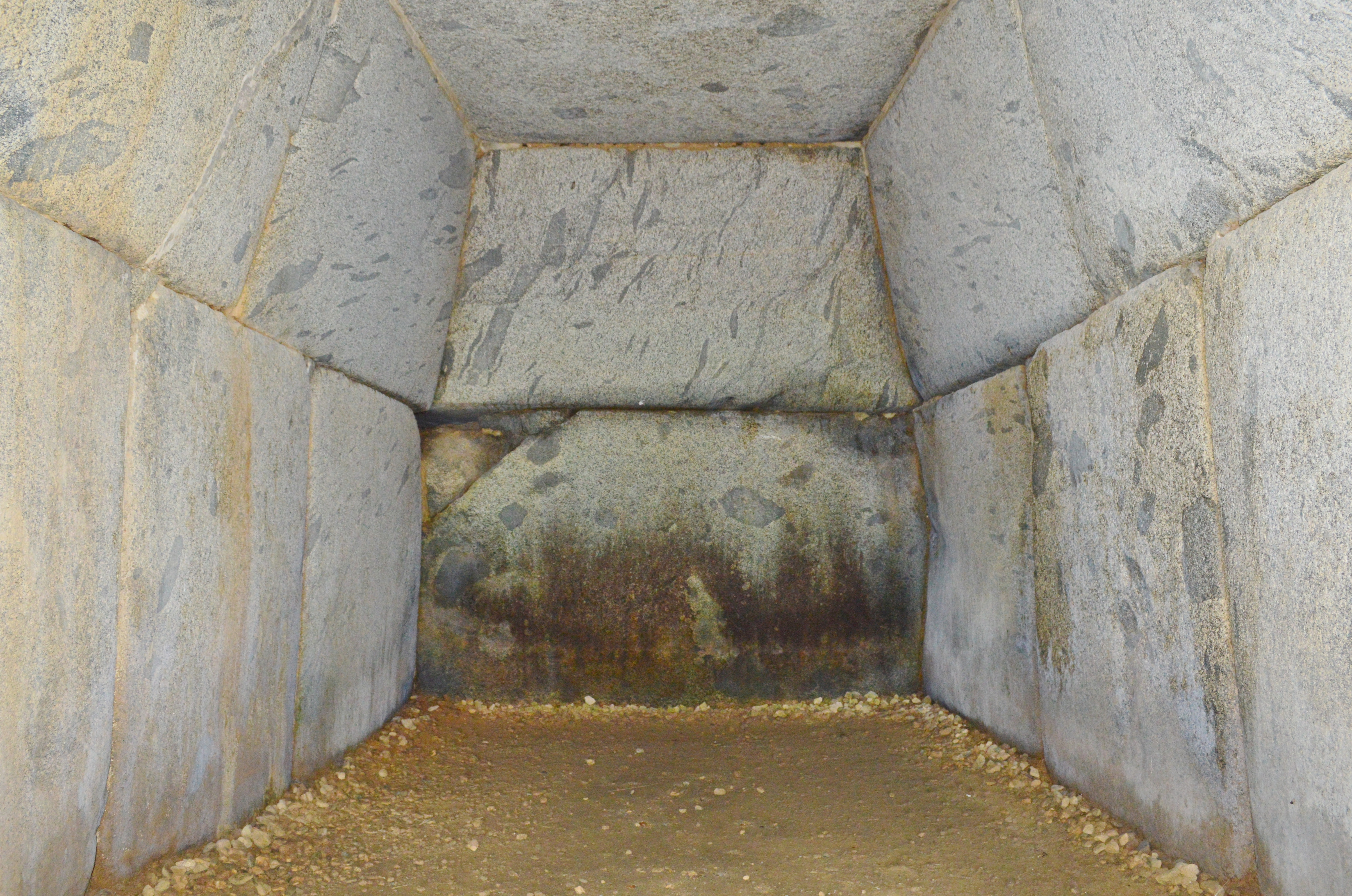 岩屋山古墳 玄室